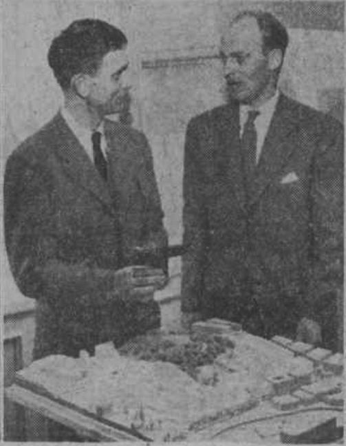 Arkitekterna Bo Sahlin och Bertil Falck